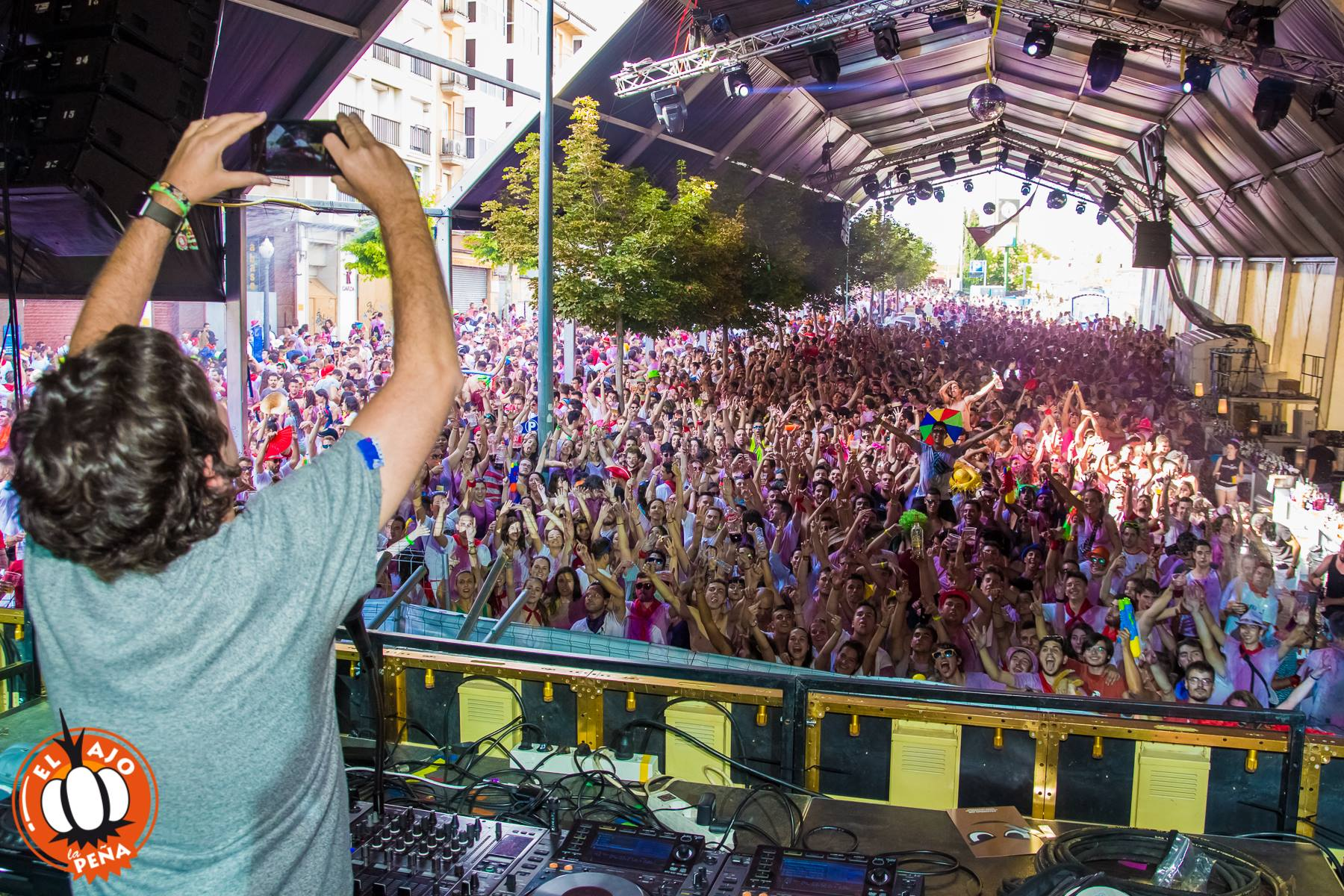 Foto en la peña El Ajo durante La Vaquilla del Ángel 2017